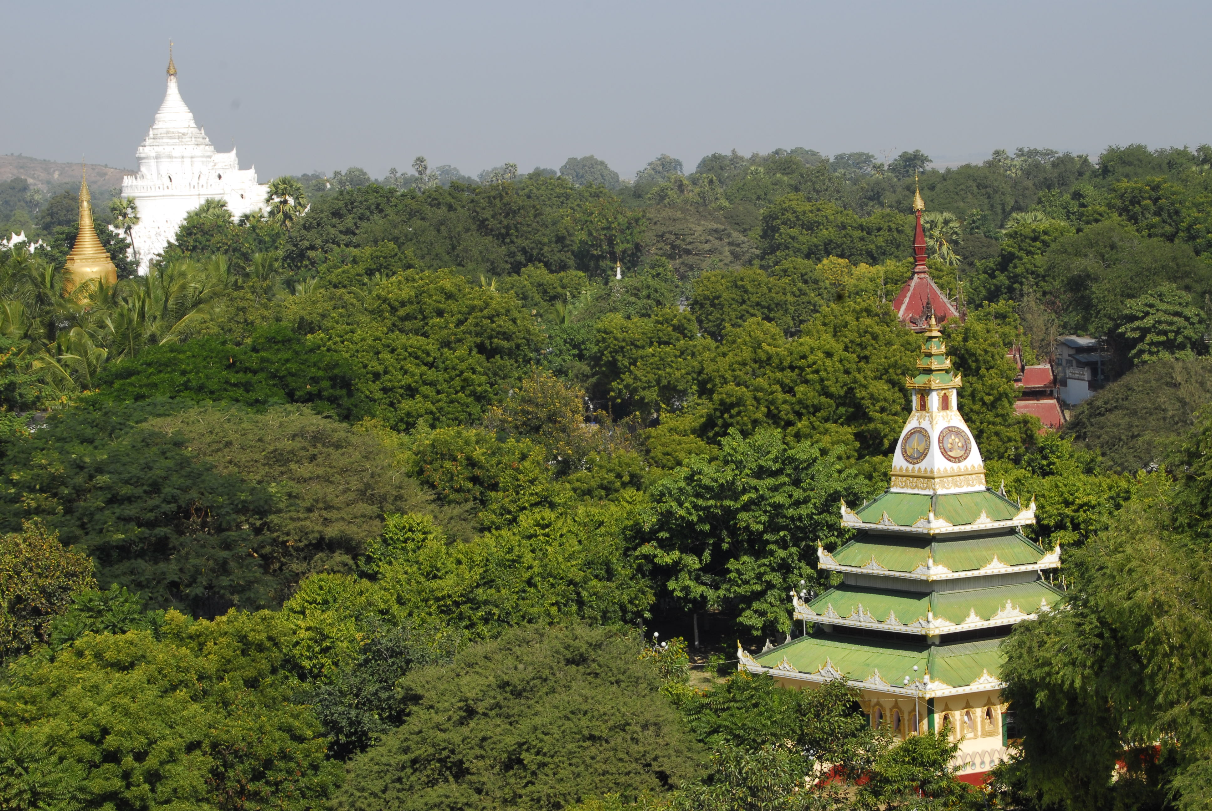 Vistas desde la inacabada de Mingun